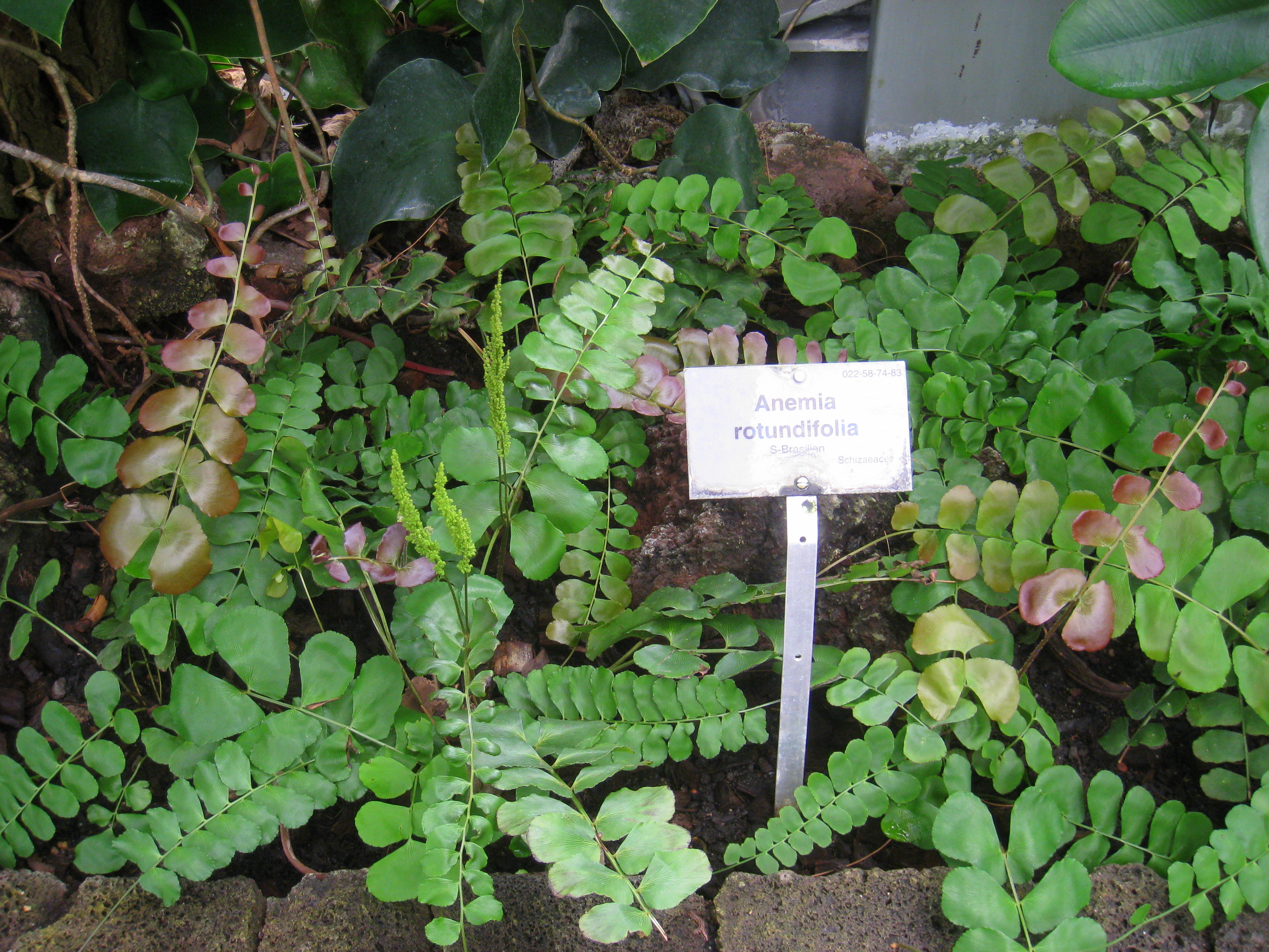 Anemia rotundifolia specimen in the Botanischer Garten, Berlin-Dahlem (Berlin Botanical Garden), Berlin, Germany.